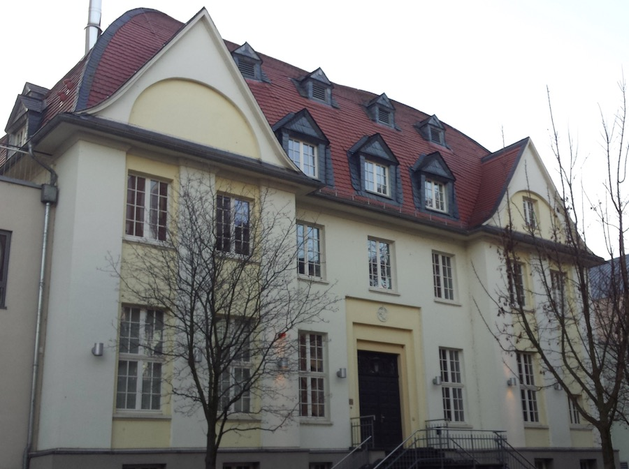 Loge Bad Kreuznach. Architekt Willibald Hamburger